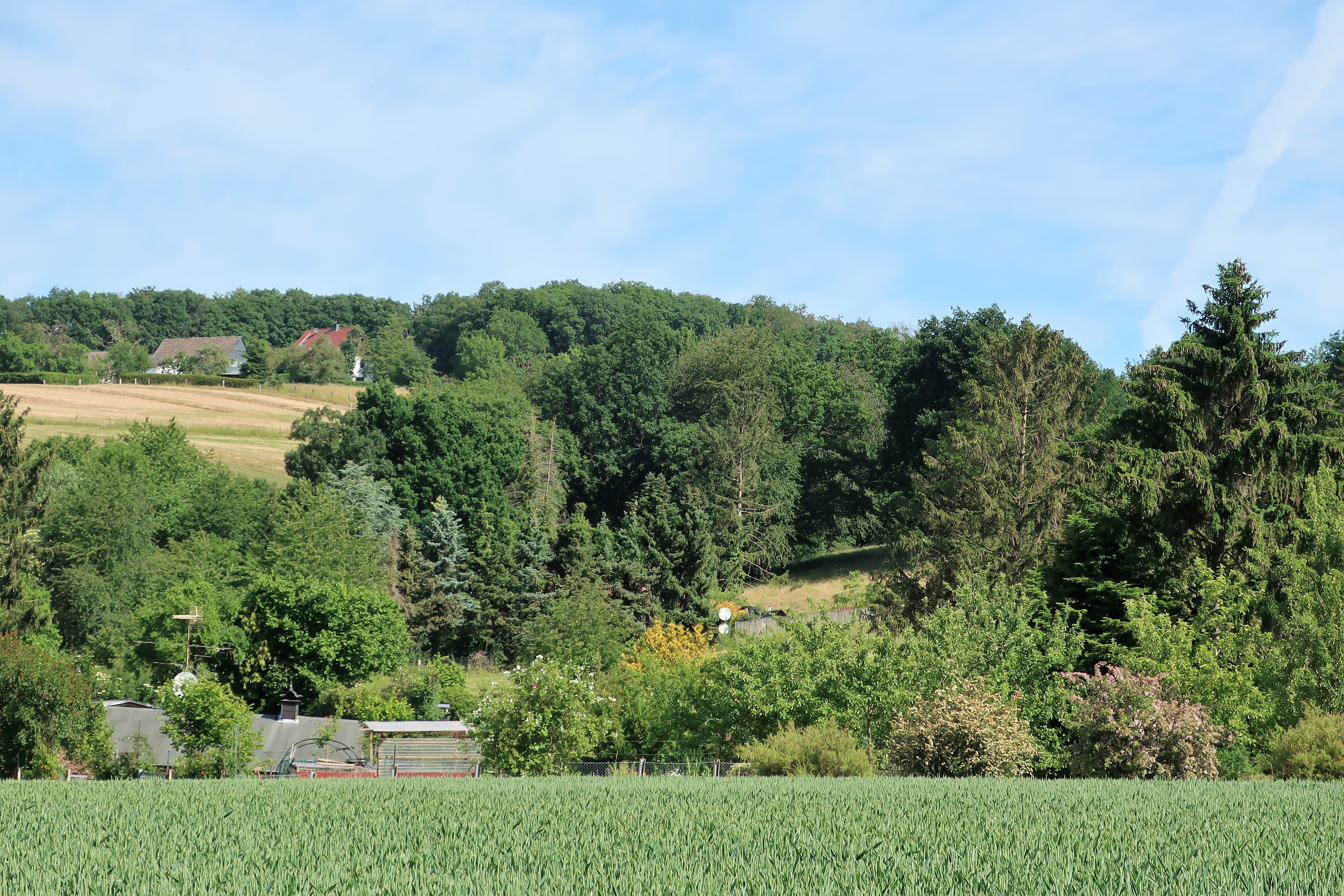 Geschützter Landschaftsbestandteil 1.4.2.15 „Siepen bei Lichtenböcken“ in Hagen-Berchum, nördlich Küsterskamp. Es handelt sich um einen tief eingeschnittenen Siepen (Fotomitte) mit einem älteren, artenreichen Gehölzbestand und mit Quellvegetation im Bereich des schmalen Bachlaufes. An lichten Stellen hat sich eine Krautschicht entwickelt. In der nordwestlichen Böschung befindet sich eine verschüttete Höhle.